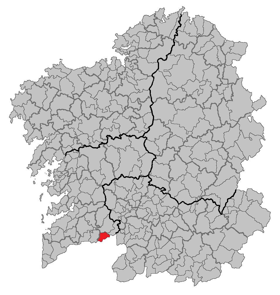 Mapa coa localización do concello de Arbo.